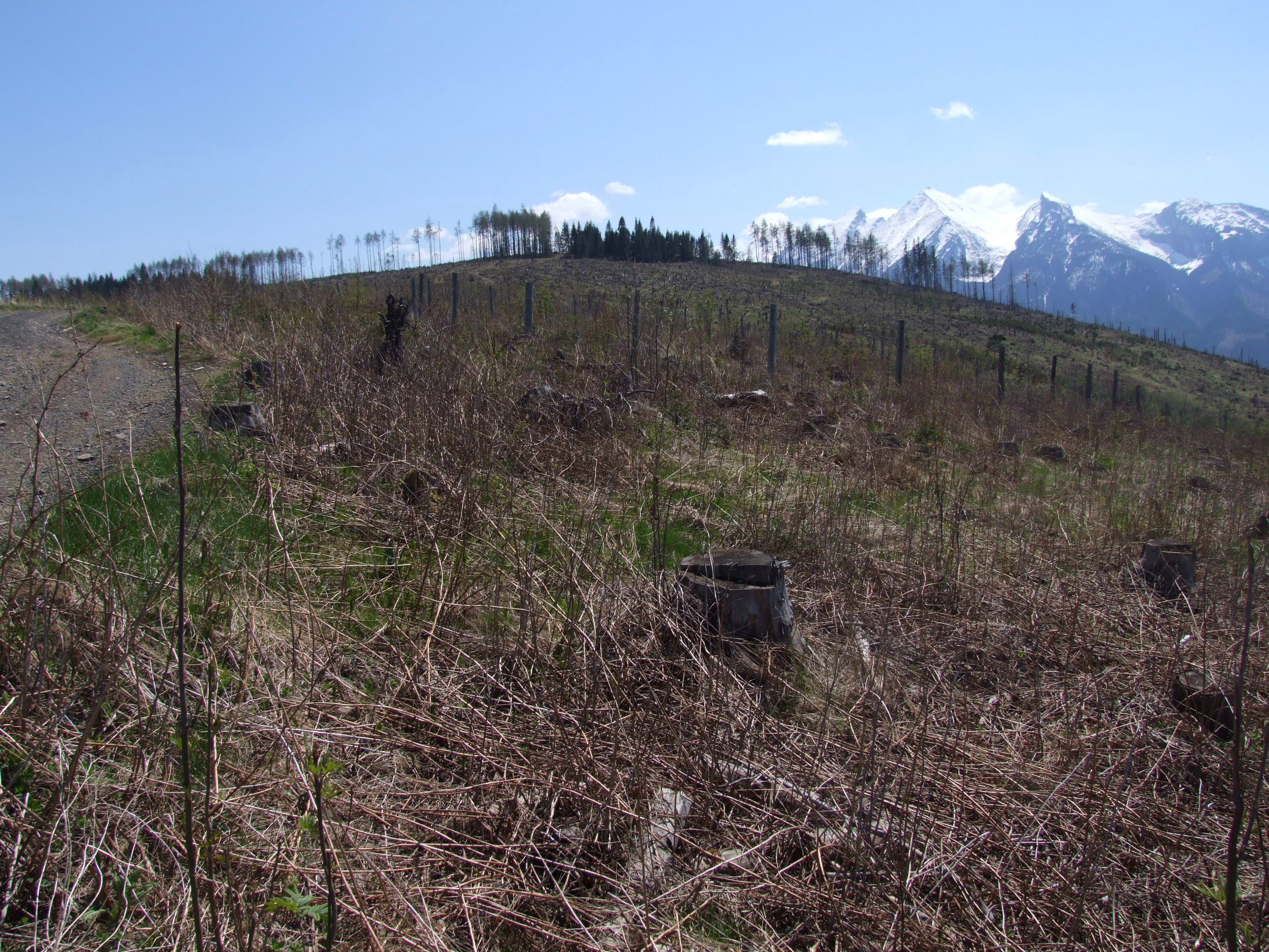 Widok z Górków Wierchu na Suchy Wierch (Magura Spiska))